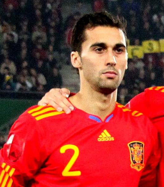 Álvaro Arbeloa